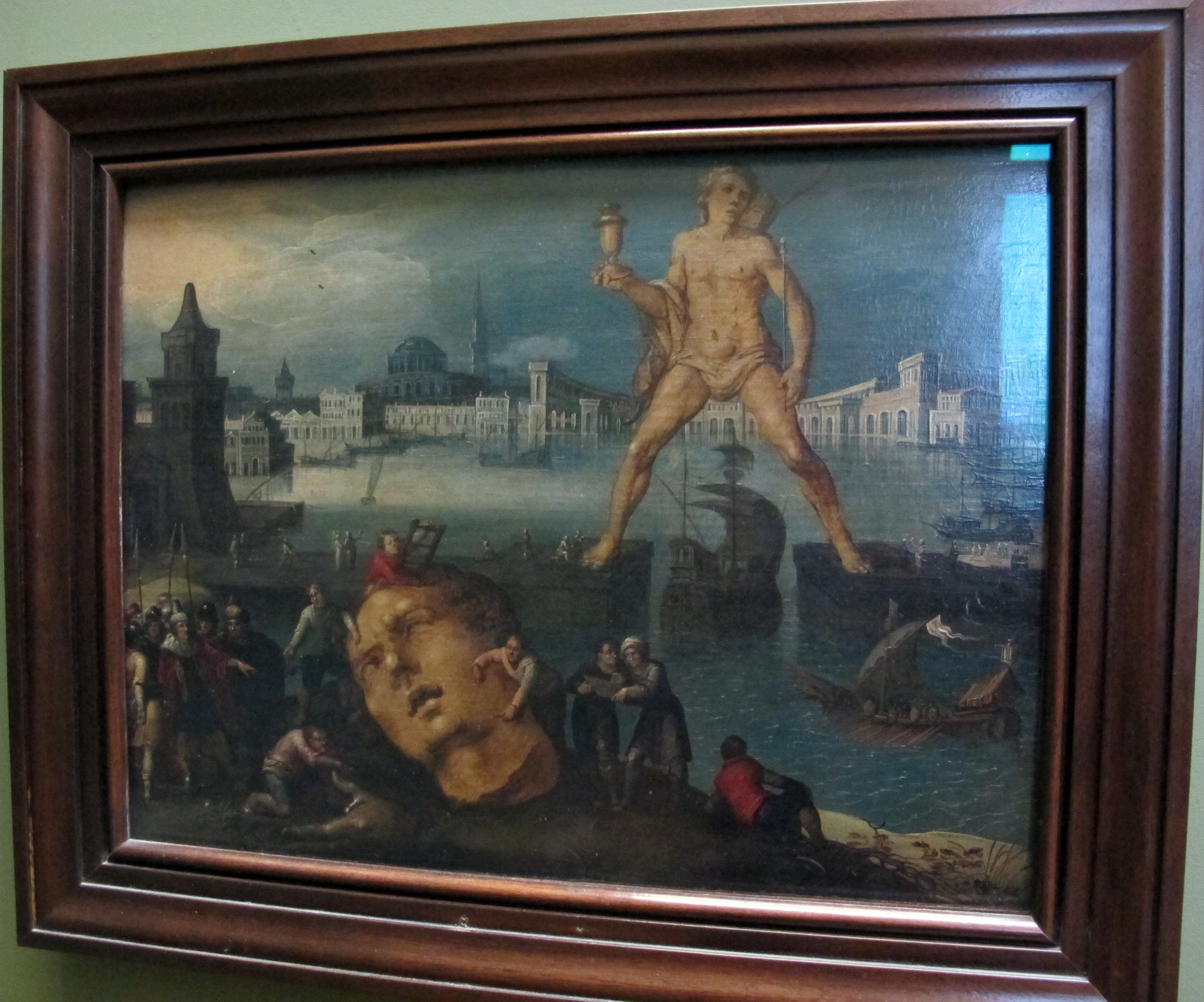 Pittura fiamminga al Louvre, Parigi